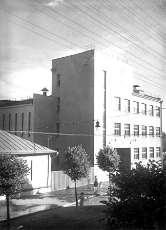 Автоматическая телефонная станция. Разрушена во время войны. Теперь на этом месте жилой дом № 8.